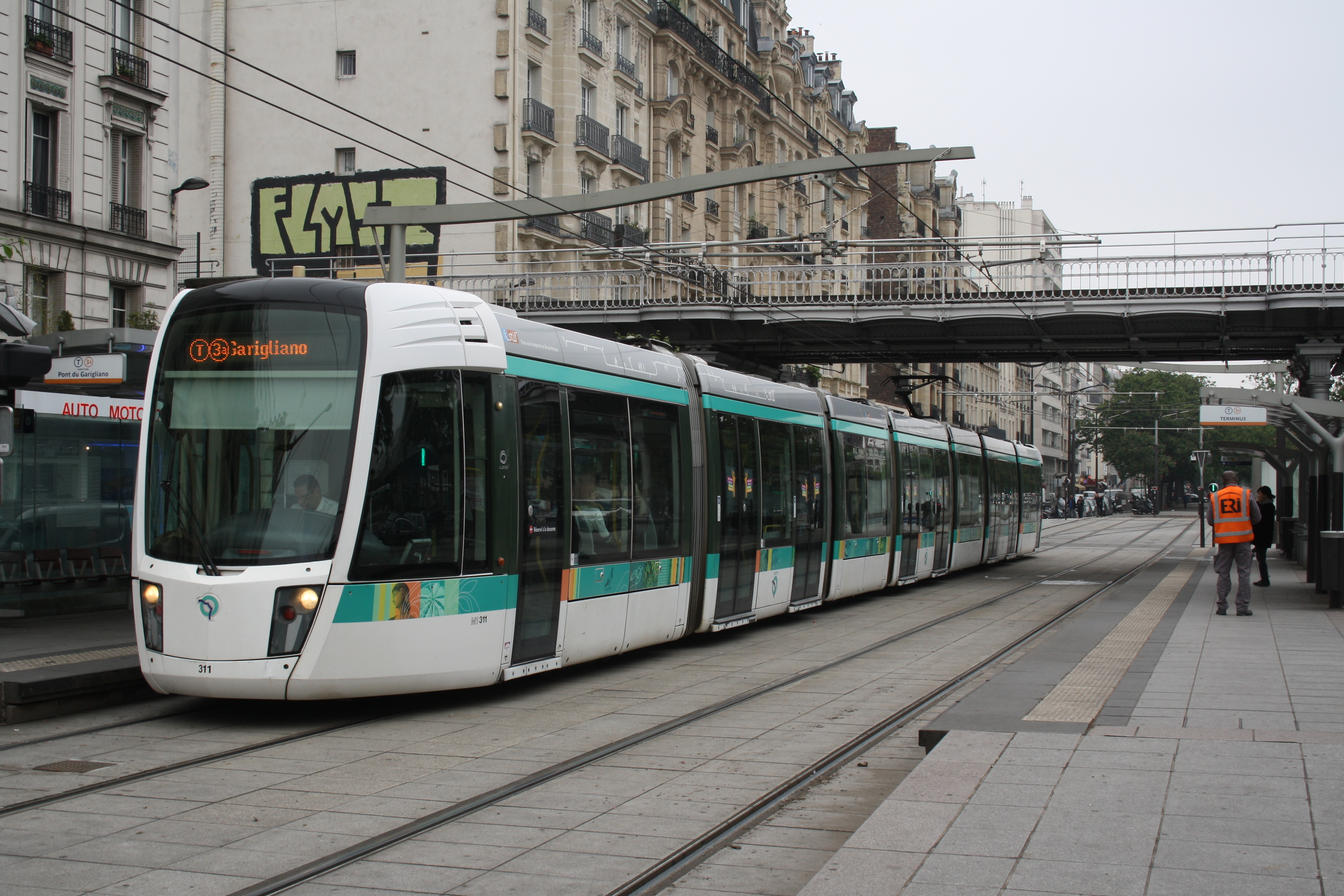 Porte de Vincennes, Endstation der Pariser Straßenbahnlinie 3a